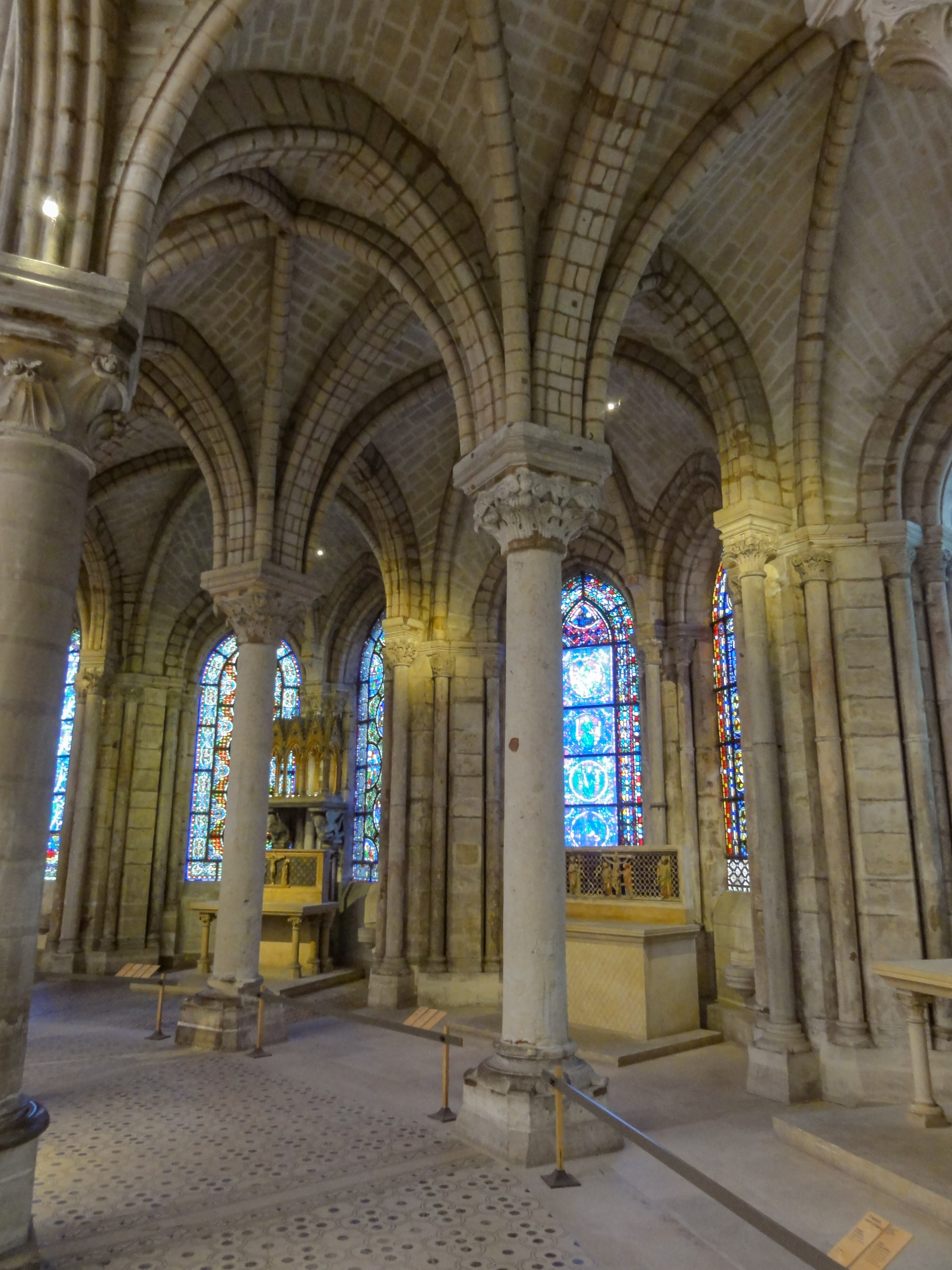 Déambulatoire.